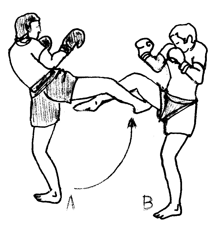 percut_arm.jpg